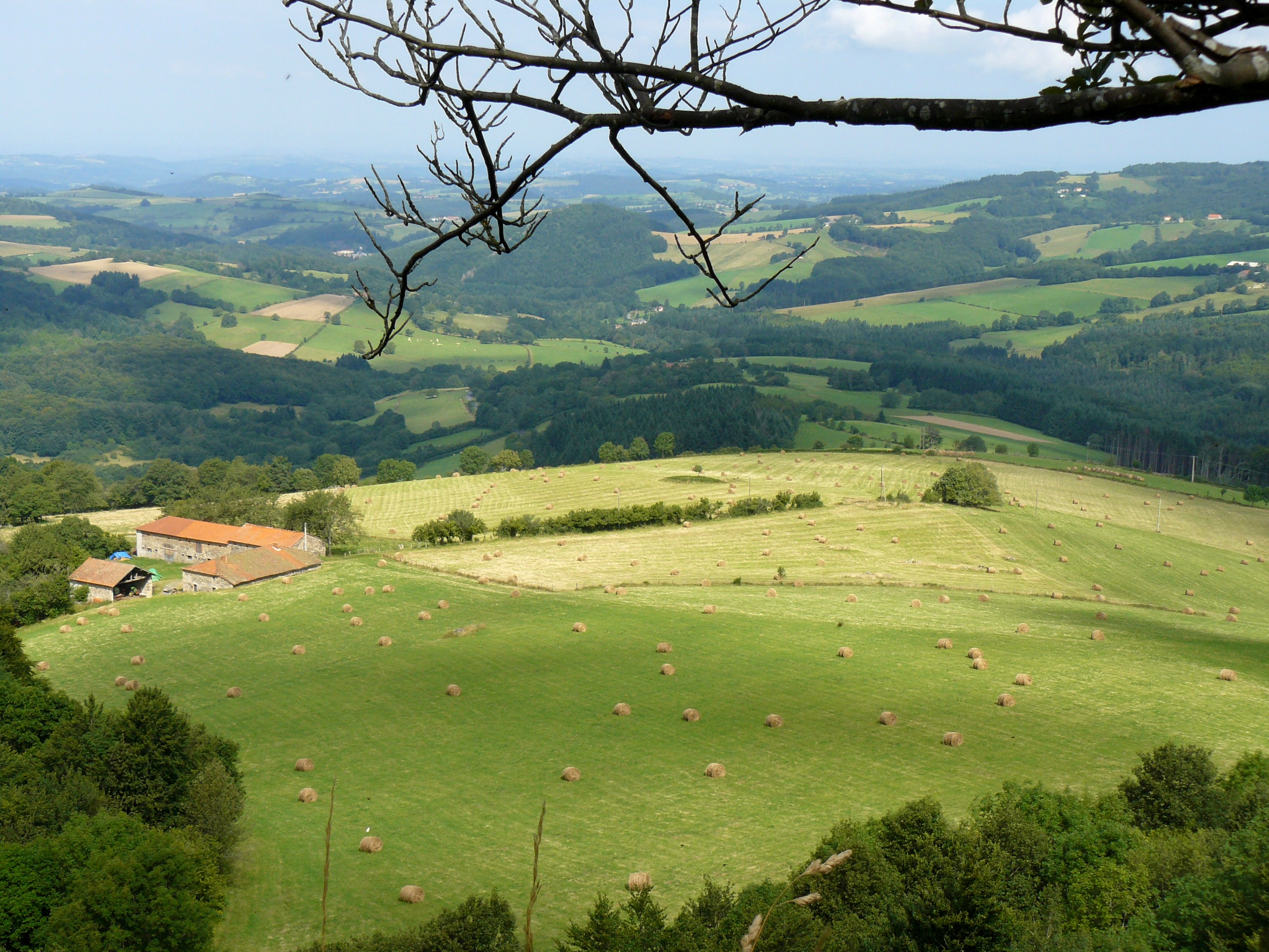 Vue de la Montagne bourbonnaise depuis le Rocher Saint-Vincent